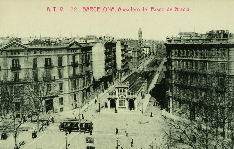 Baixador del passeig de Gràcia (Barcelona, Catalunya), obra de 1902.